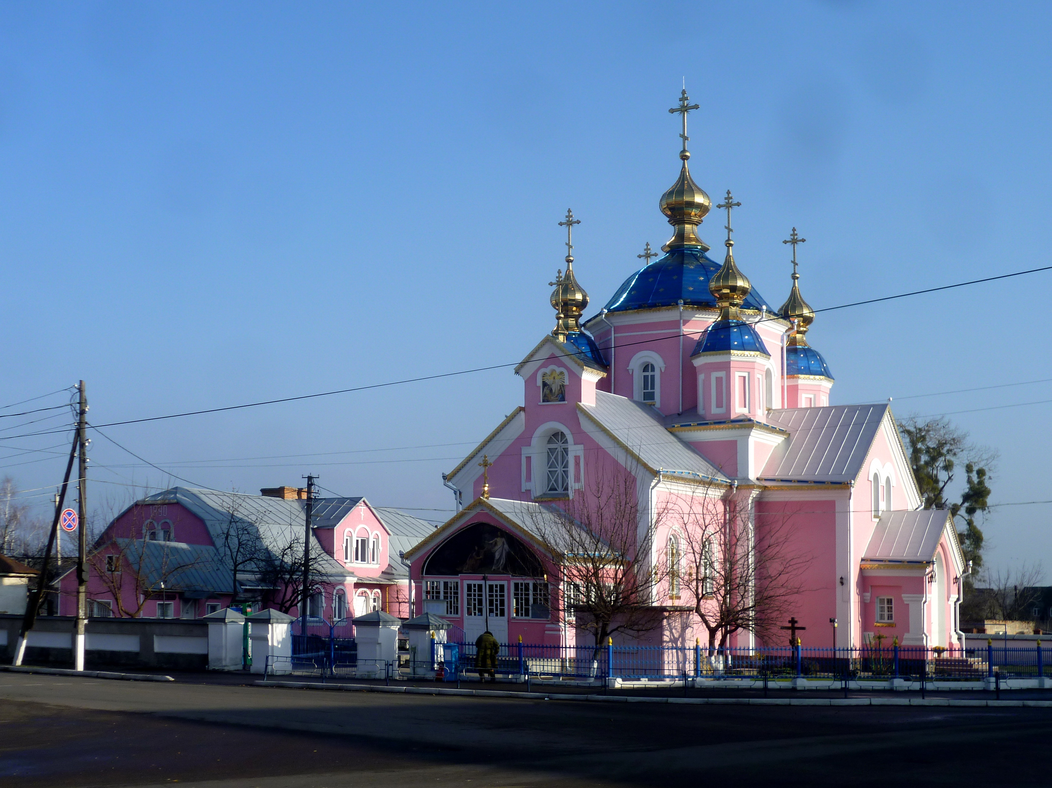 Воскресенська церква (1877 р.) - загальний вигляд - м.Ковель (вул.Незалежності 174) Волинська область Україна